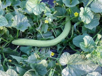 Cucumis melo, pepino serpiente